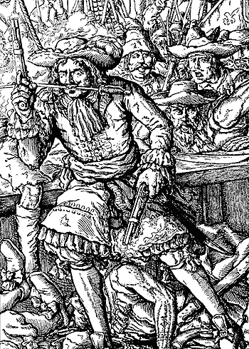 Мишель де Граммон во время абордажной схватки